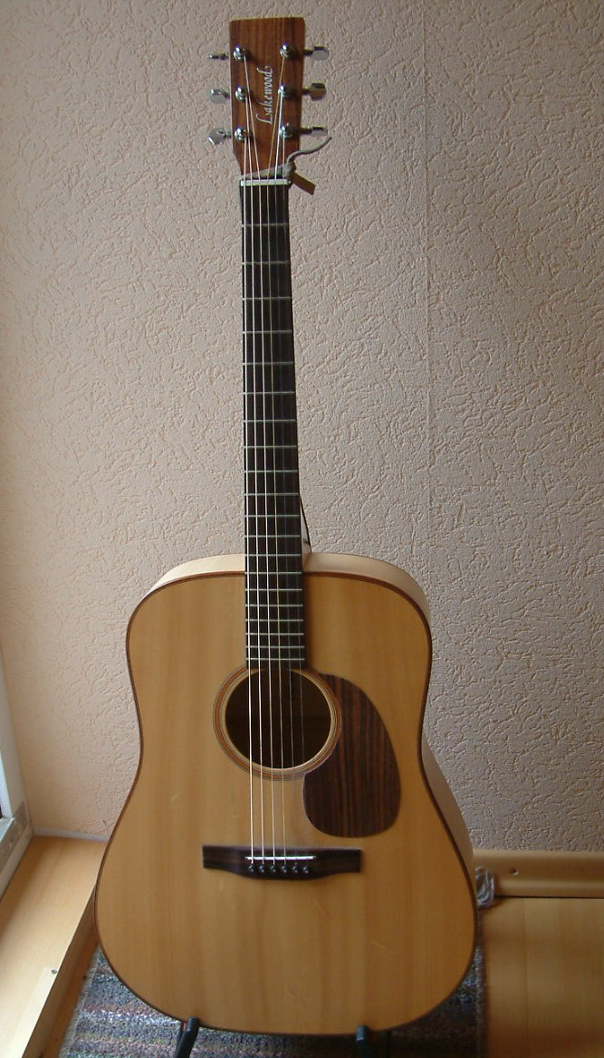 Lakewood Gitarre D12 aus dem Jahr 1991